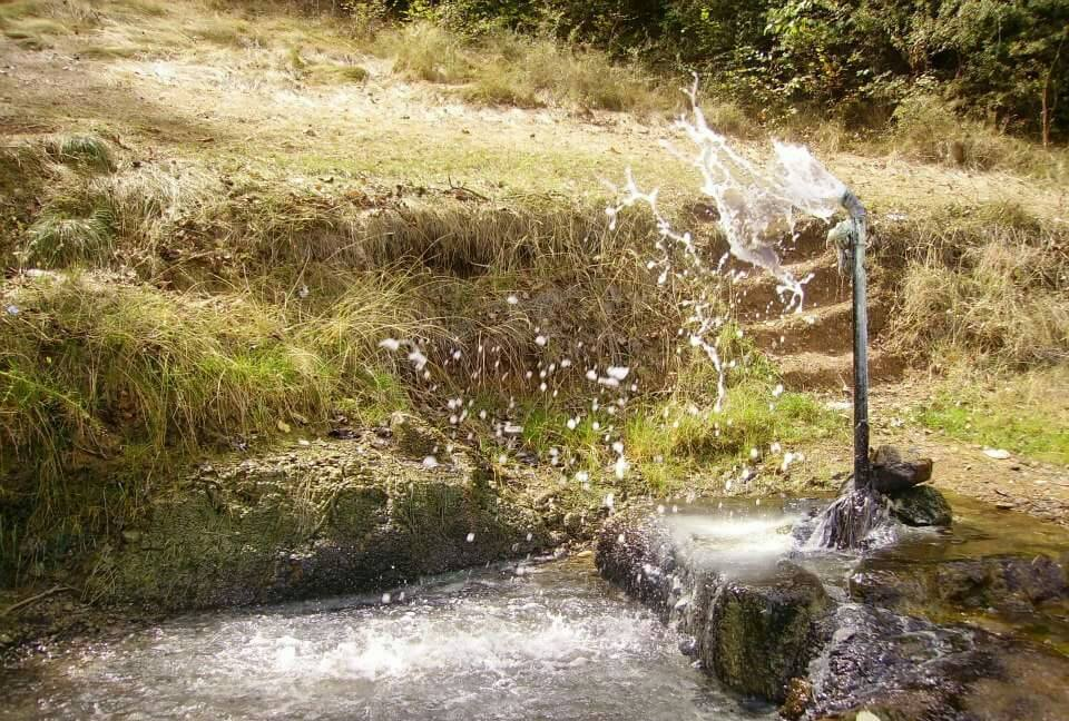 Кисела вода у Туларској бањи